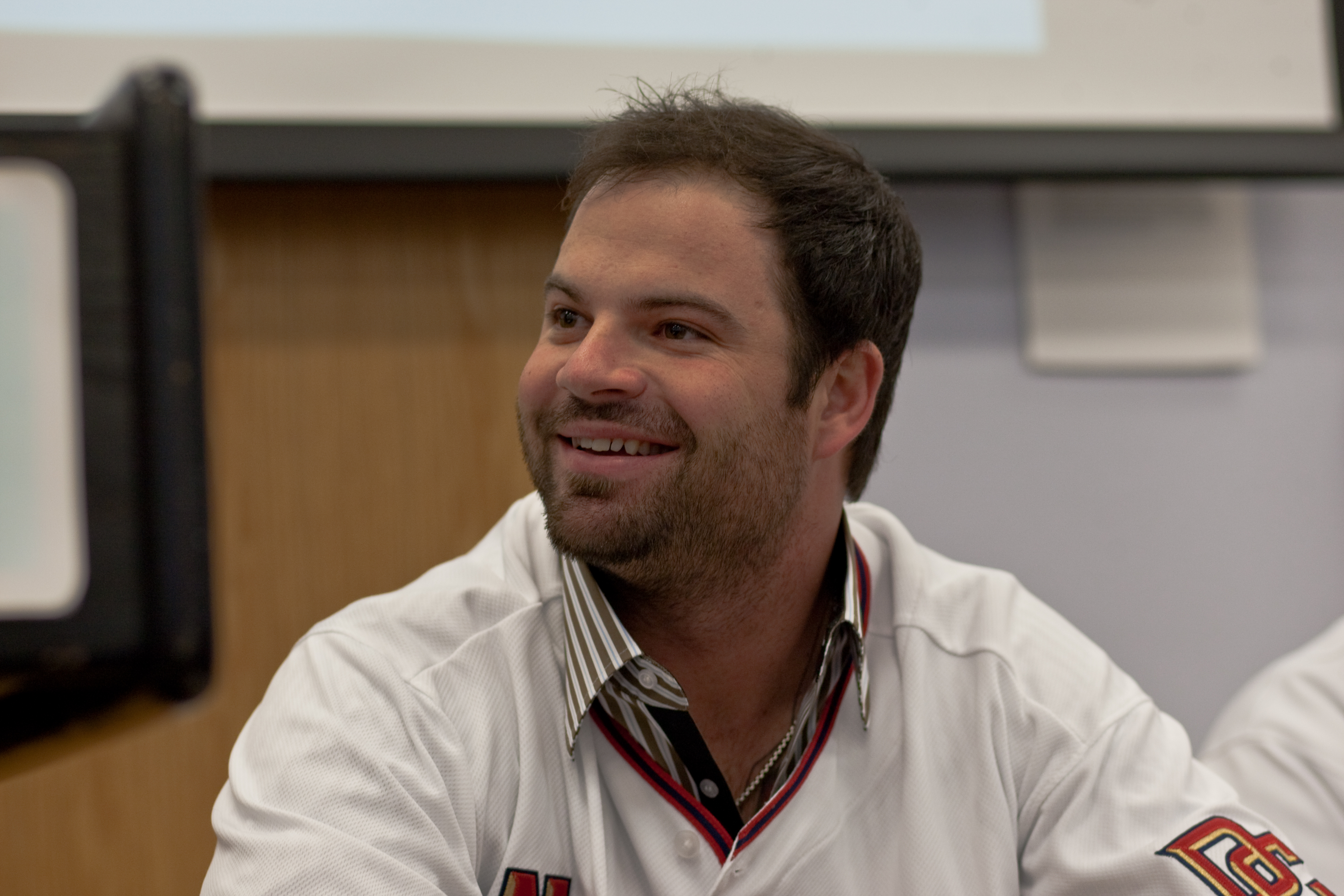 Brian Bruney